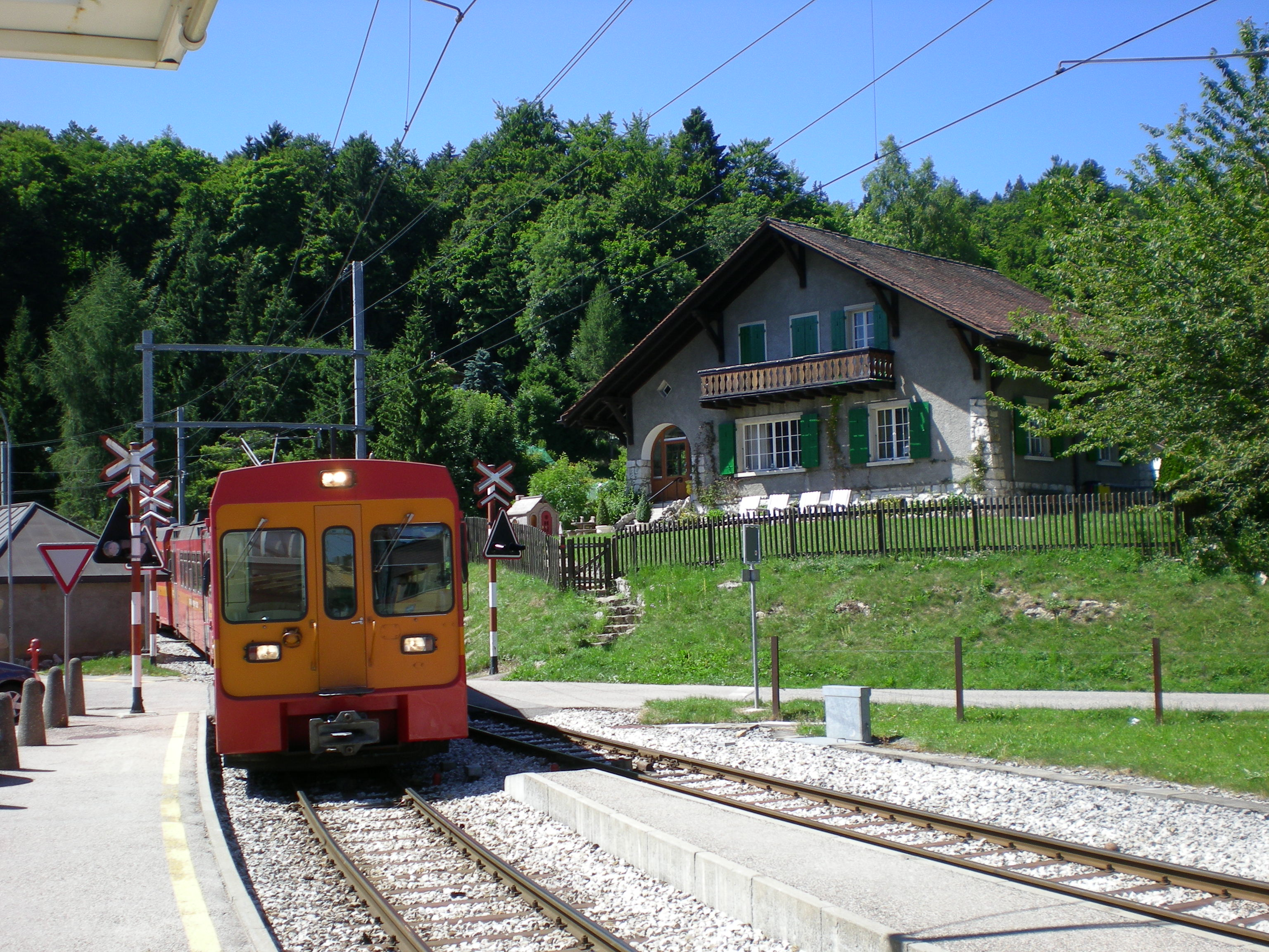 Banhofeinfahrt von St. Cerque